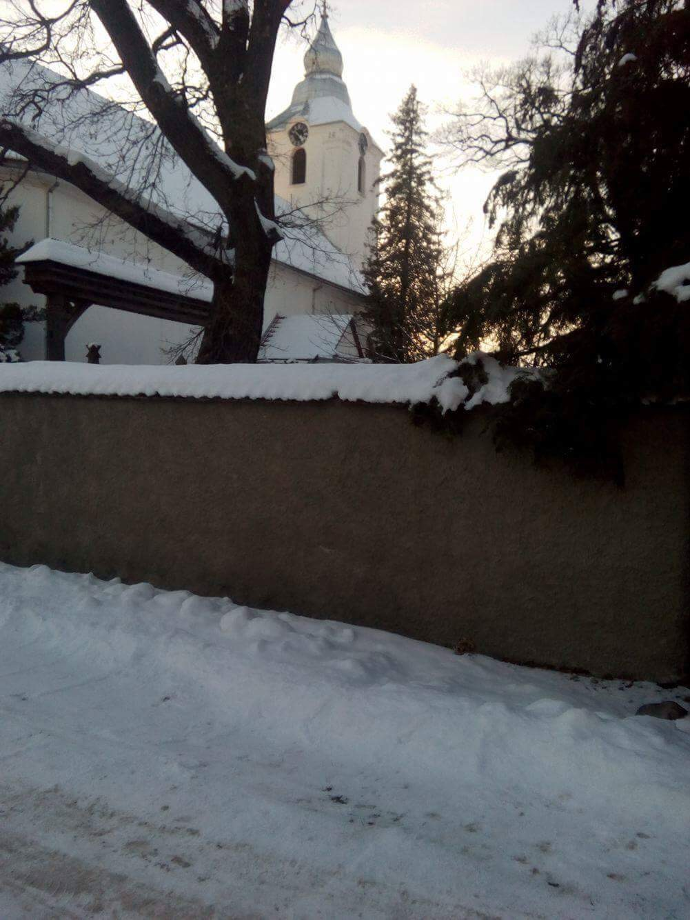 Kovászna Római katolikus templom